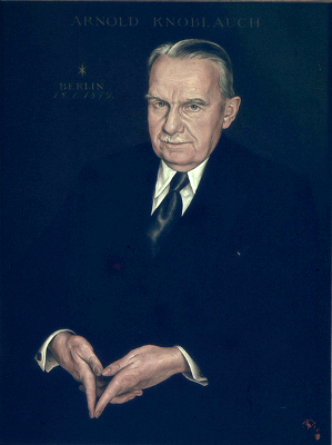 Foto eines Porträts von Arnold Knoblauch, gemalt von Werner Schramm, 1952